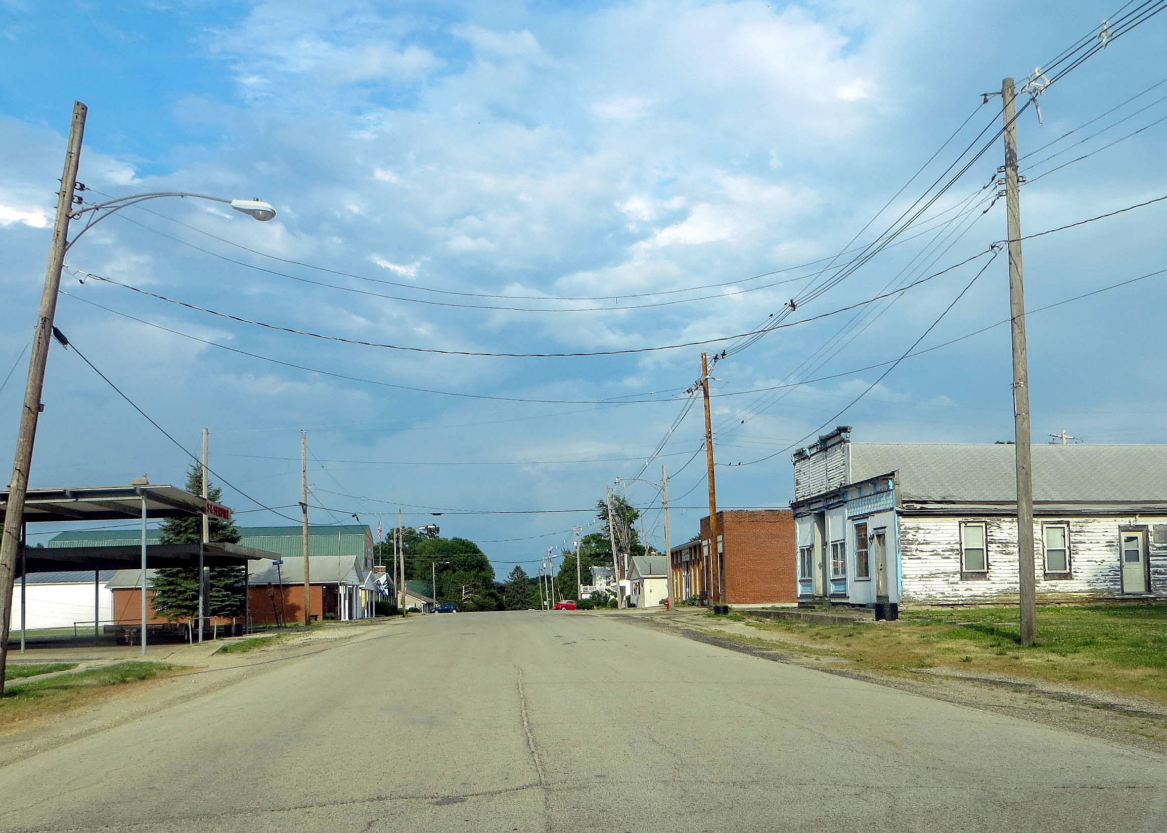 Biggsville, Illinois.